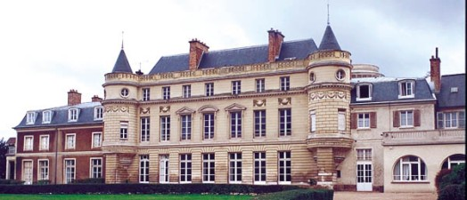 Photo du chateau de l'établissement scolaire Notre Dame "Les Oiseaux situé à Verneuil-sur-Seine (Yvelines) en banlieue parisienne.